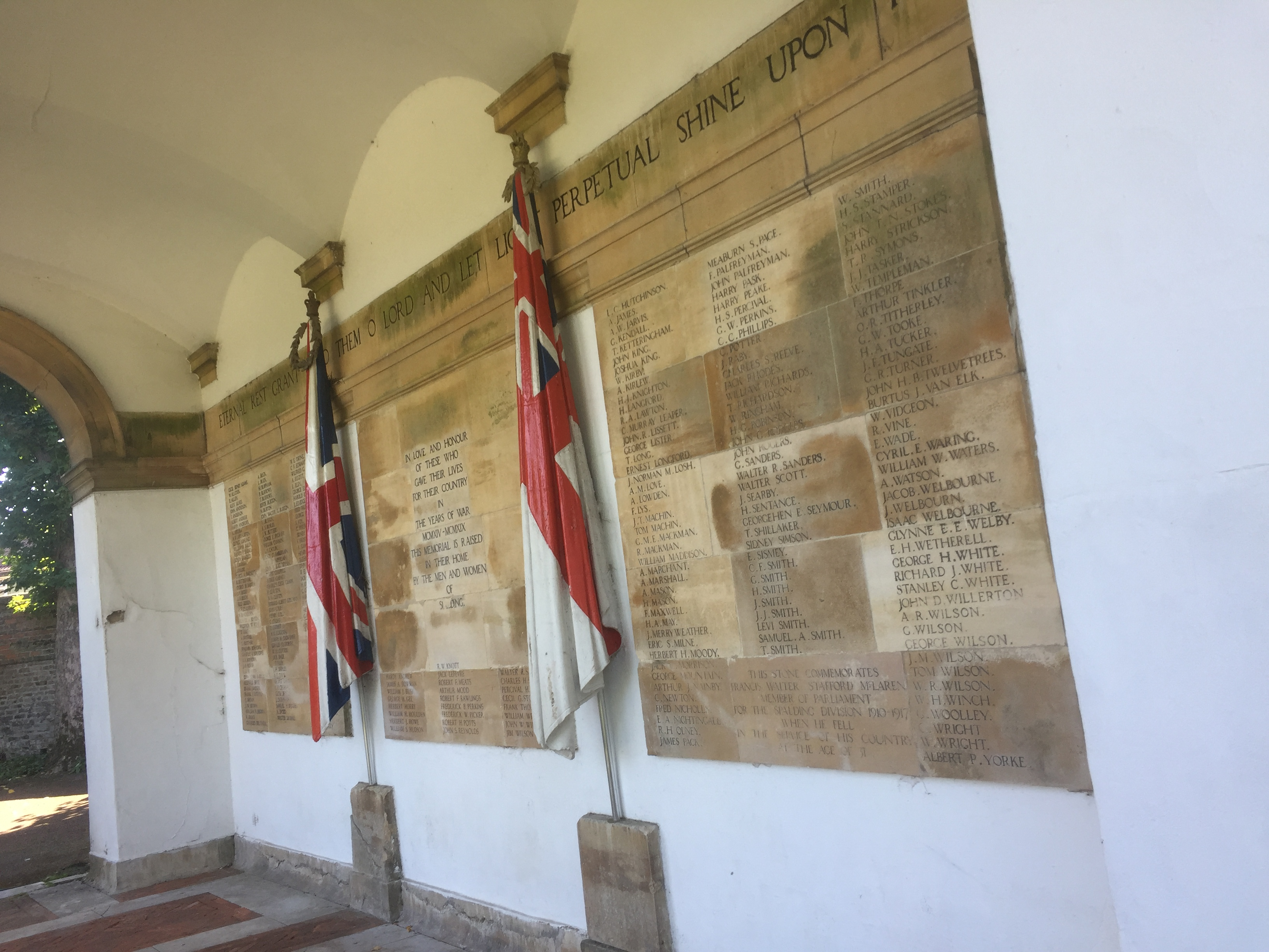 Spoldingo muziejus